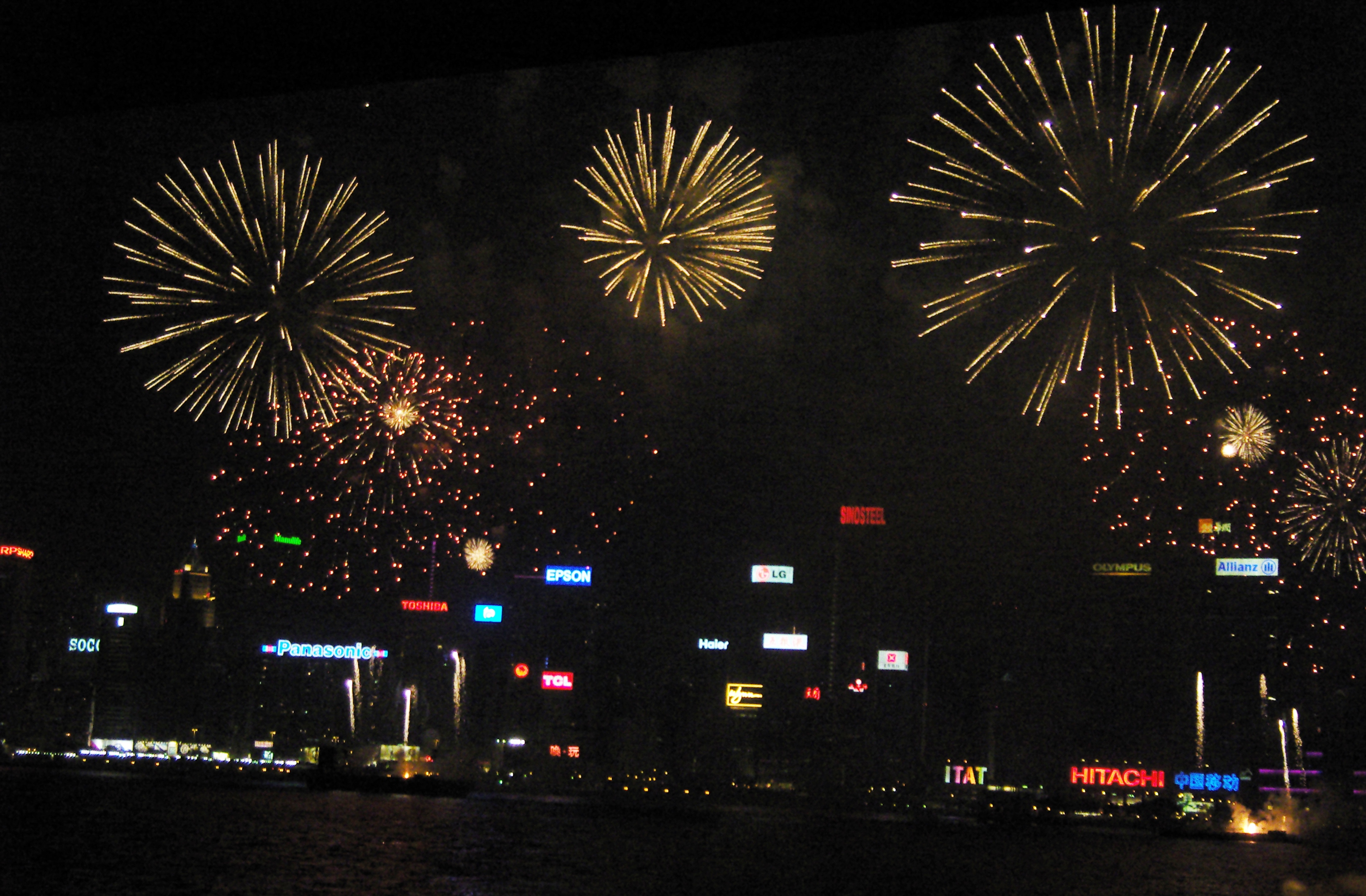 2008年國慶煙花匯演